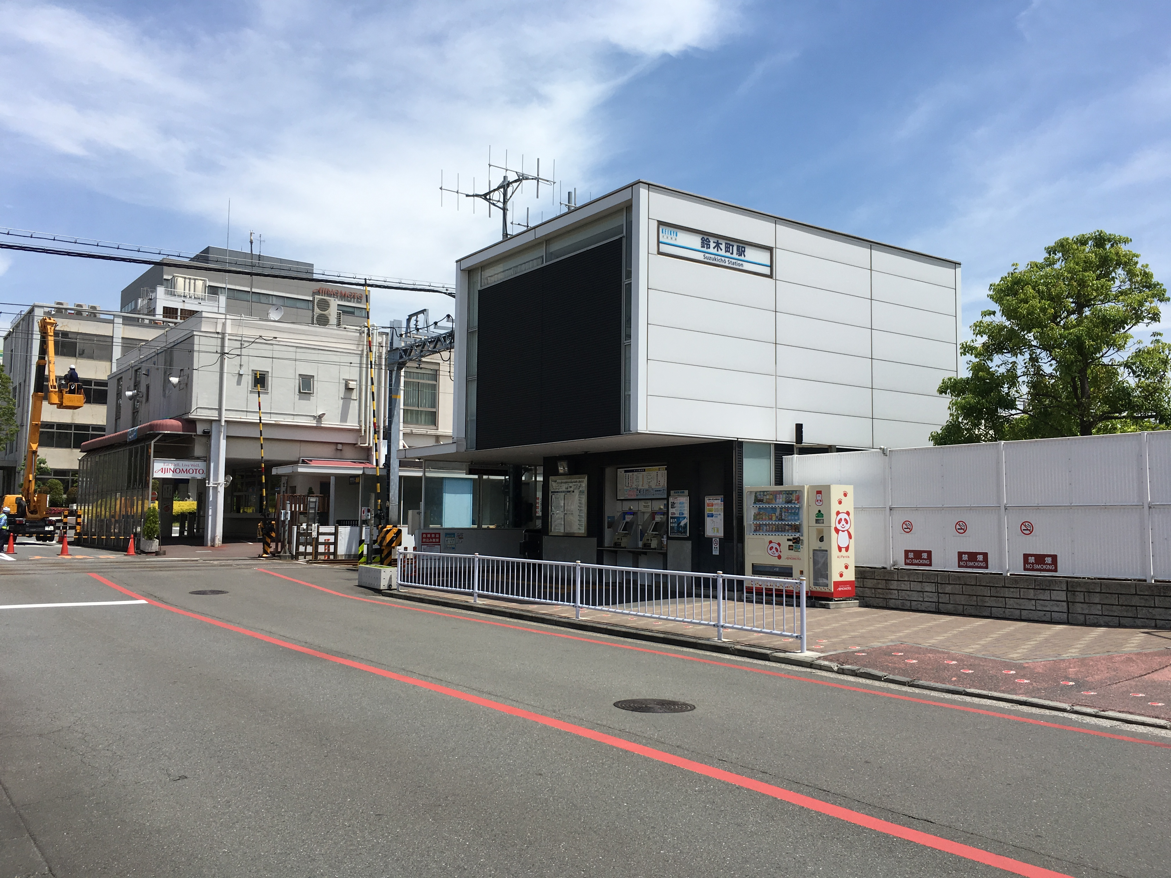 駅舎改良後の鈴木町駅舎。